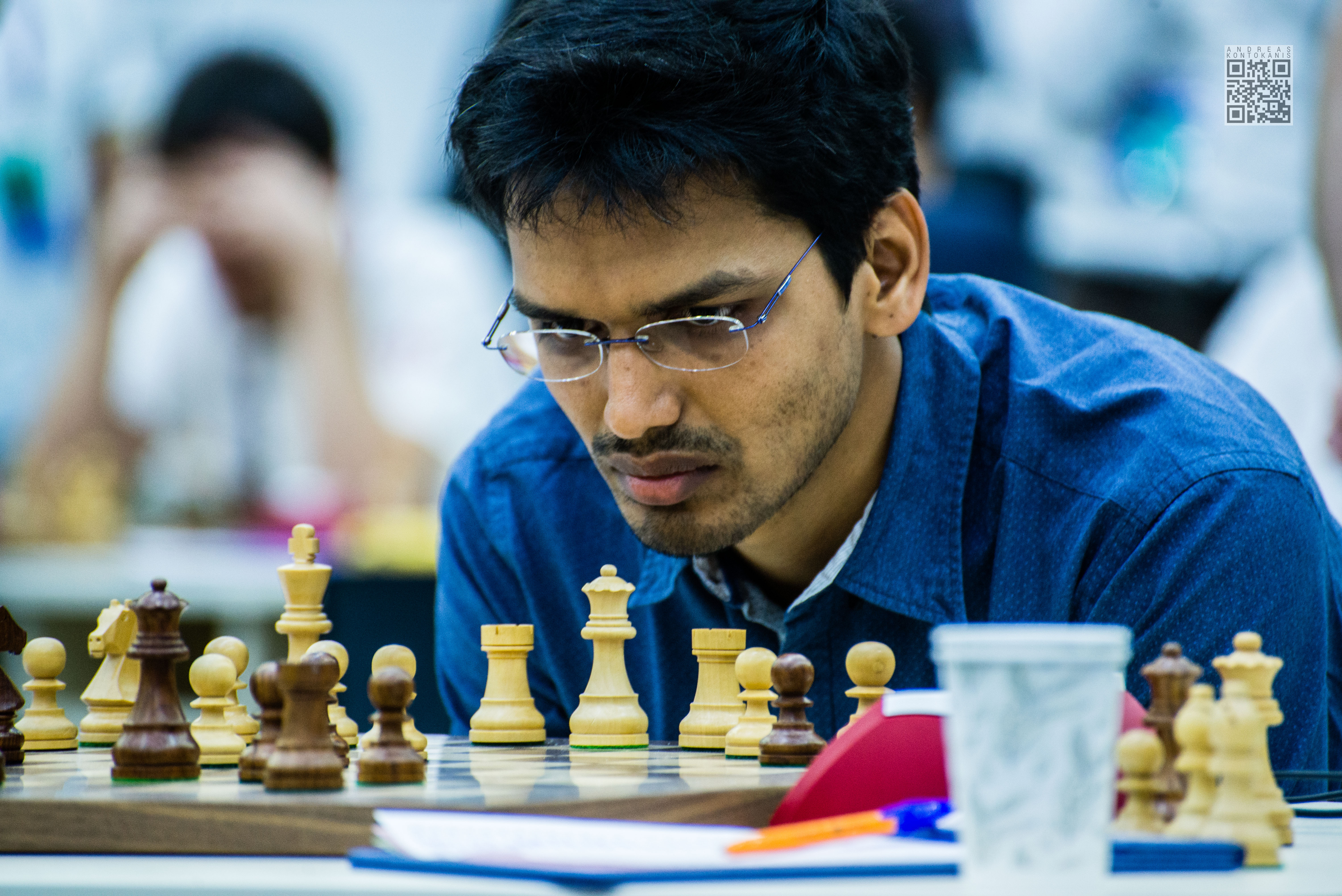 Harikrishna Pentala